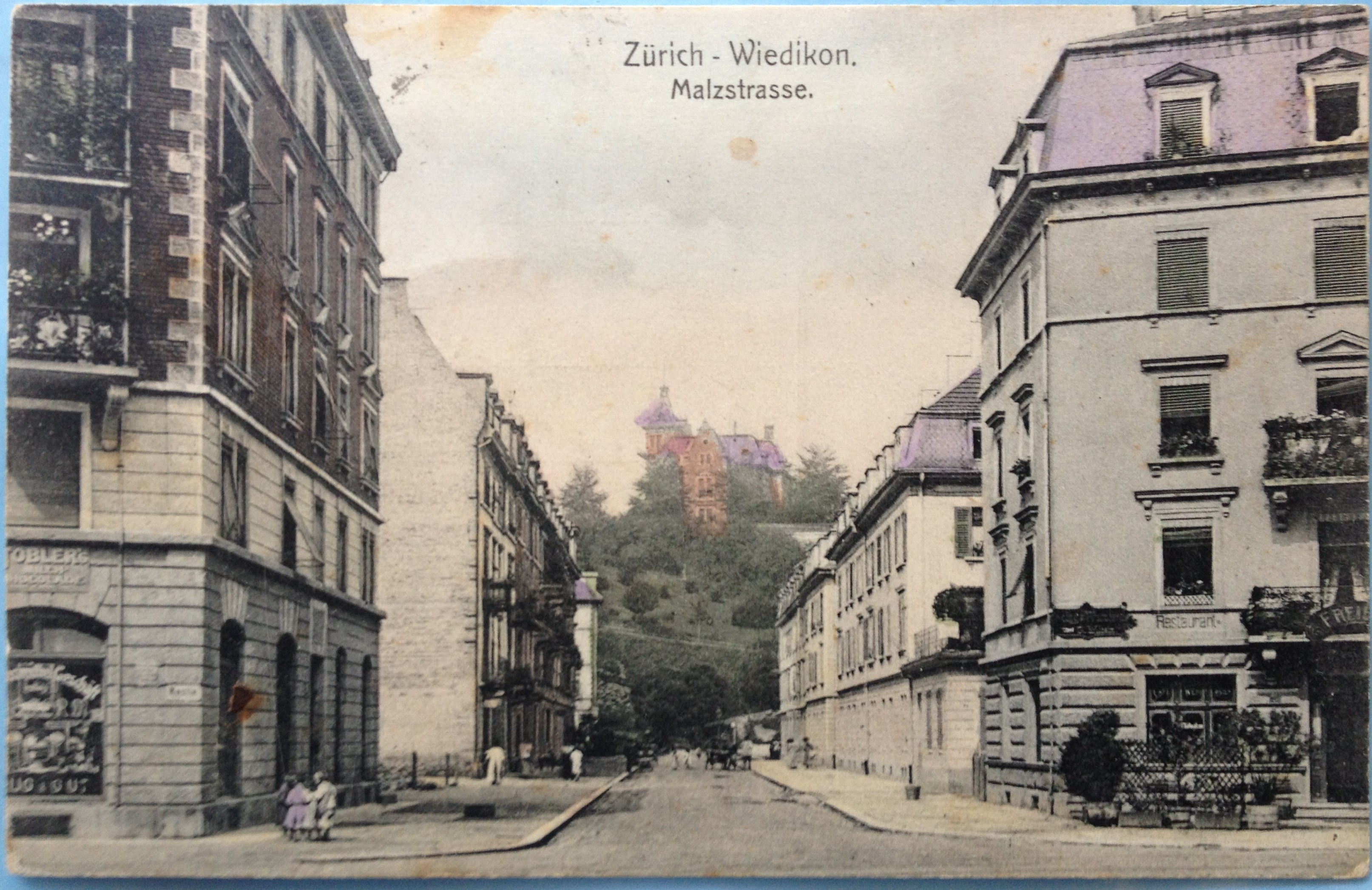 Blick in die MALZSTRASSE (vom heutigen Manesseplatz aus gesehen) in Zürich-Wiedikon auf einer Ansichtskarte aus dem Jahr 1907. Standort der Ansichtskarte: Heimat- und Ortsmuseum Zürich-Wiedikon. Aufnahme durch Jakob Vetsch am 24.04.2013.